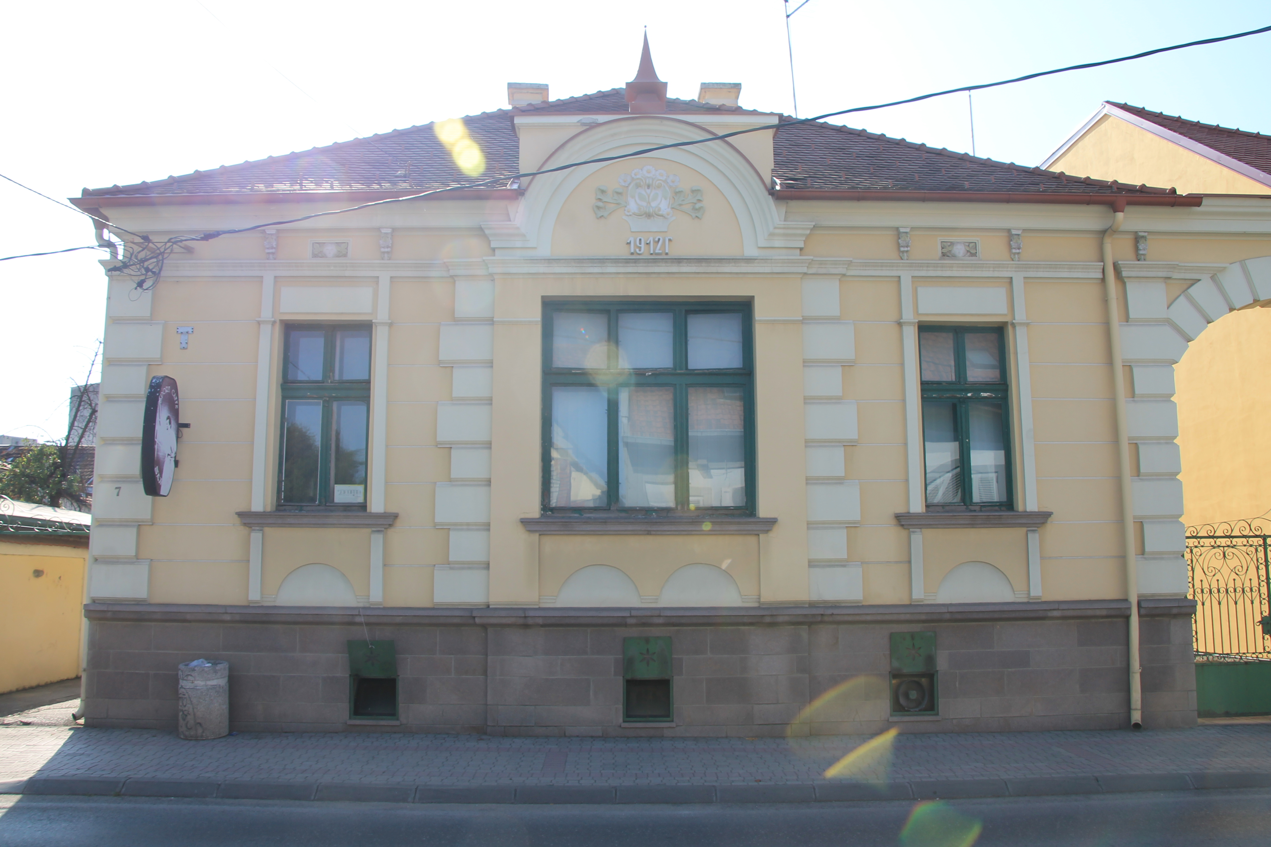 Buildings in Čačak